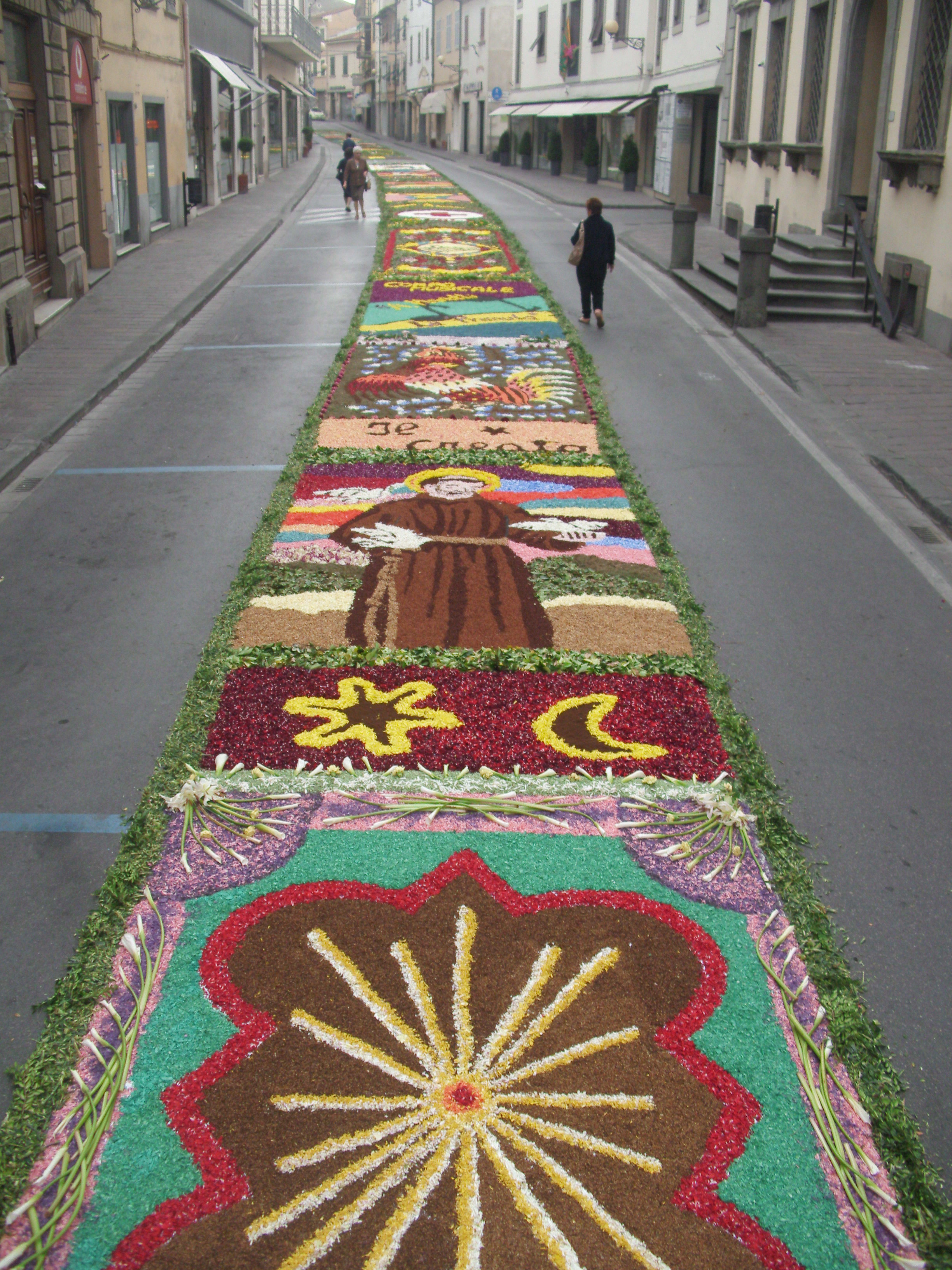 i tappeti di corso matteotti. ogni anno questa strada e altre 3 nel centro di fucecchio vengono ricoperte da splendide opere fatte con fiori , foglie e semi